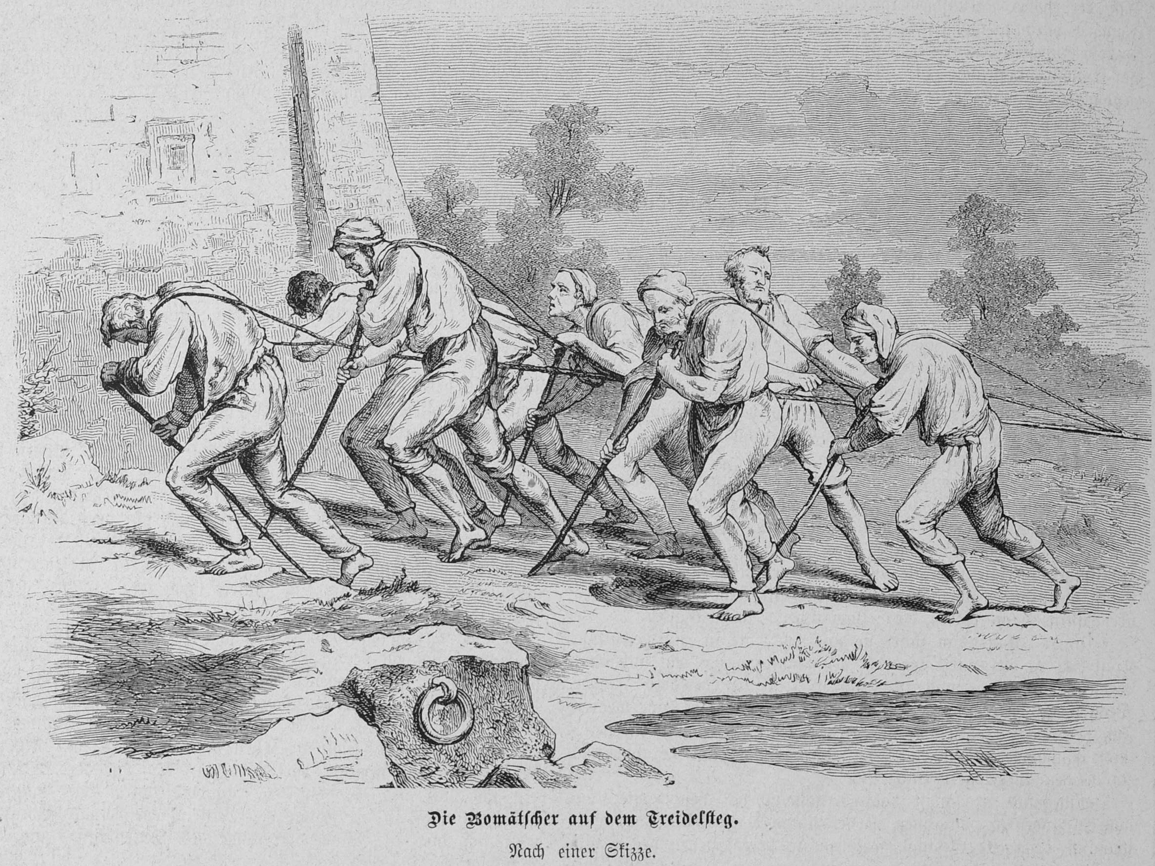 Die Bomätscher auf dem Treidelsteg. Nach einer Skizze.